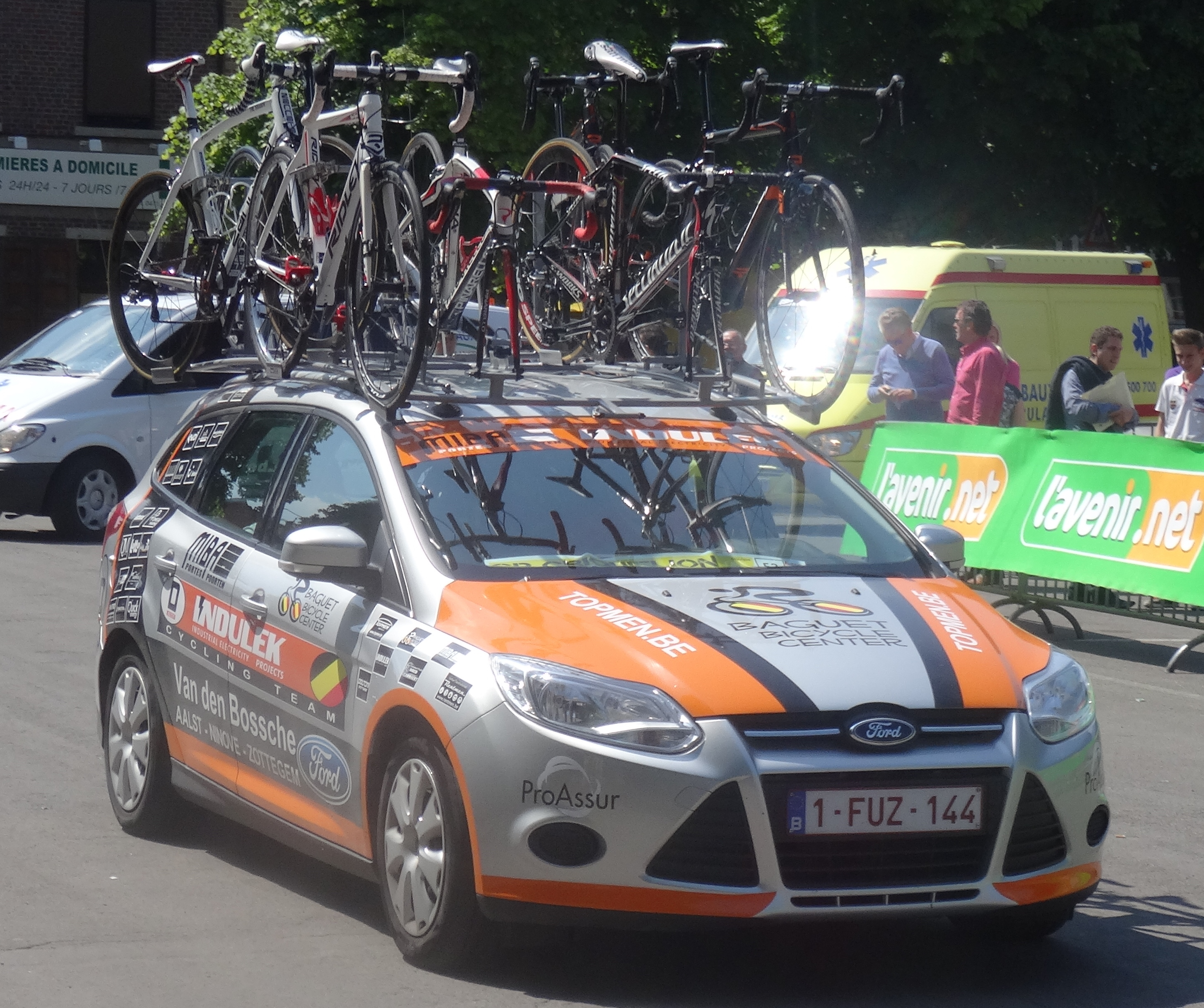 Reportage réalisé le samedi 17 mai à l'occasion du départ du Grand Prix Criquielion 2014 à Boussu, Belgique.